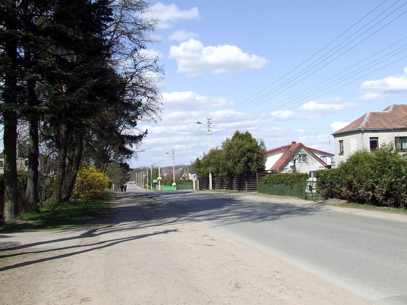 Romainių gatvė Romainiuose.